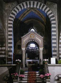 Badia di san salvatore, interno